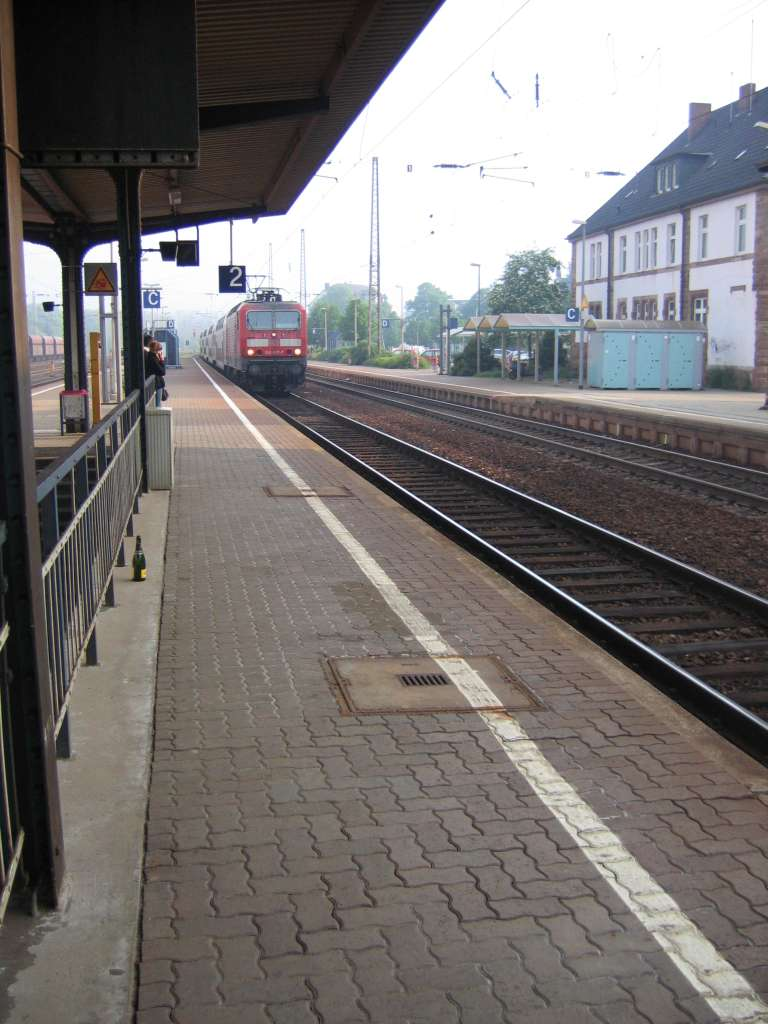 Gleis zwei des Merziger Bahnhofs bei einfahrendem Regionalexpress nach Mannheim